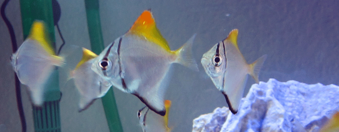 Schwarm junger Silberflossenblätter im Meerwasseraquarium (reines Jungfischbecken)